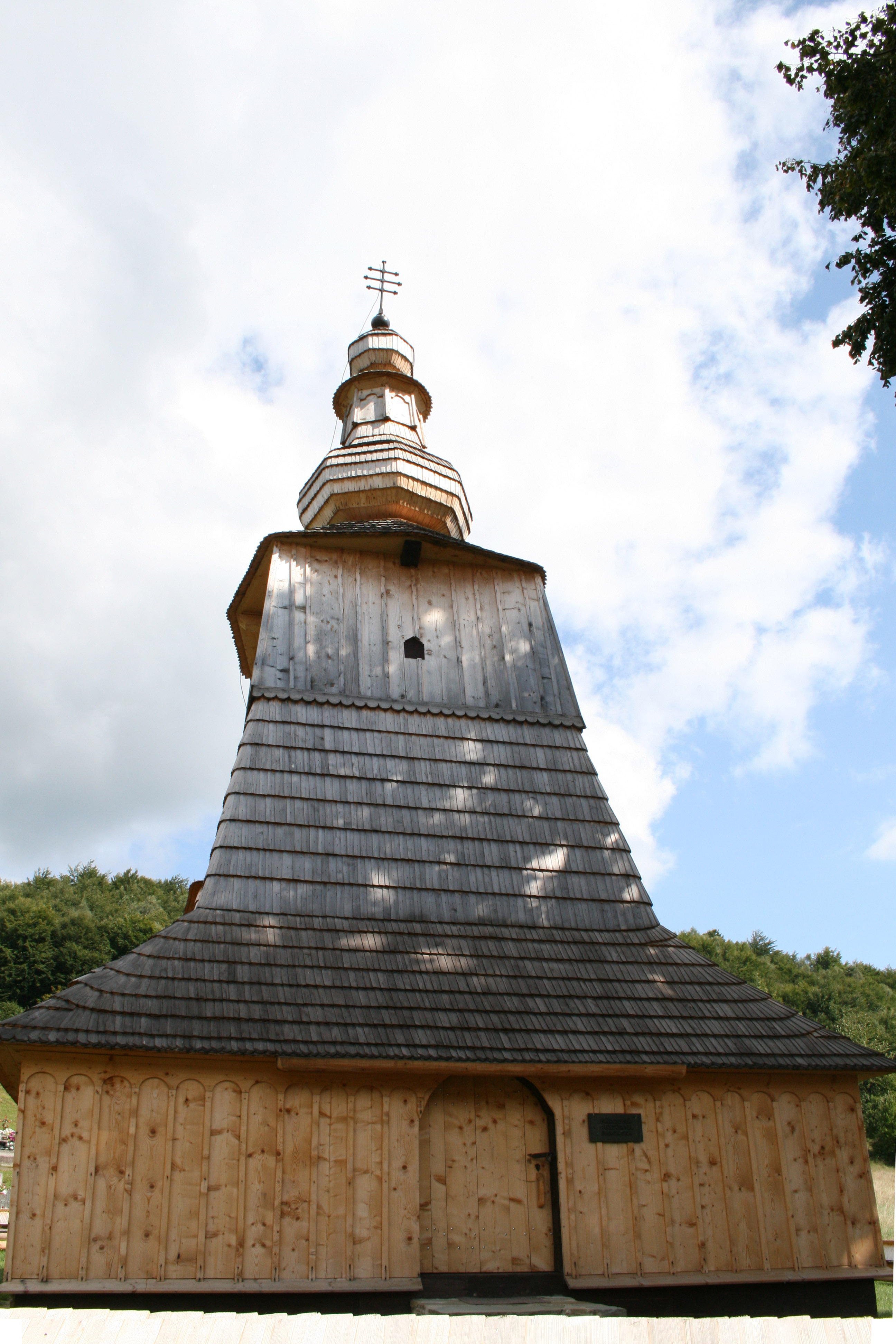 Pohľad na južné vstupné podvežie miroľskej cerkvi